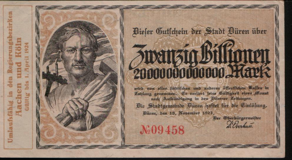 20 Billionen Mark Schein der Stadt Düren Notgeld der Stadt Düren 1923 001.jpg